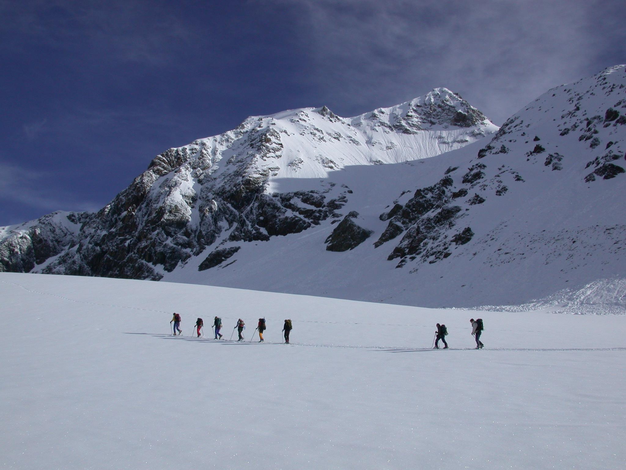 Aufstieg auf die Wildspitze. Bild von einer alpinen Skitour im ungesicherten Gelände. Auf der rechten Bildseite sind im schattseitigen, felsdurchsetzten Gelände kleinere Lawinenabgänge zu erkennen.